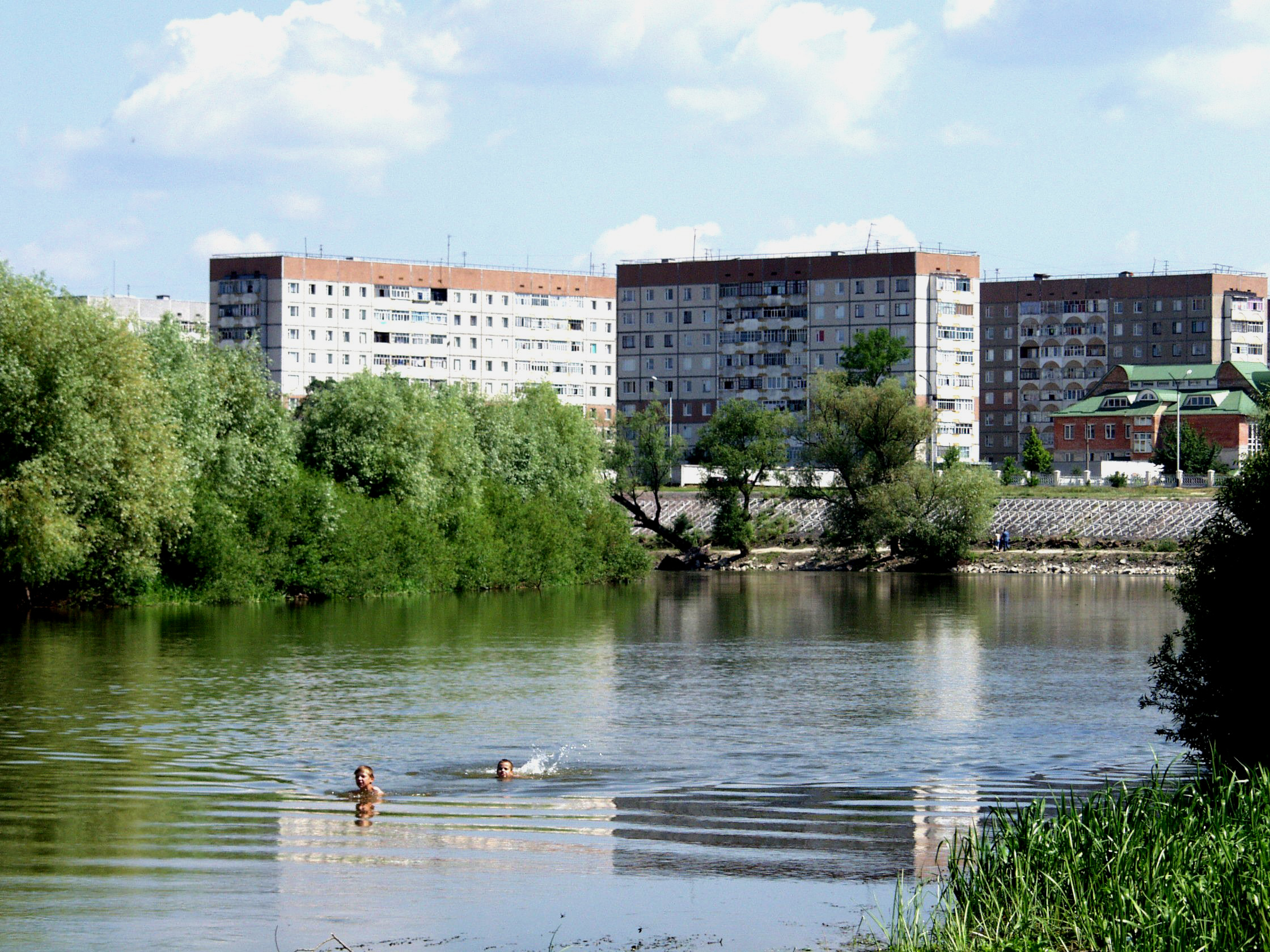 Река Стырь в Кузнецовске летом. Ровенская область. Украина.